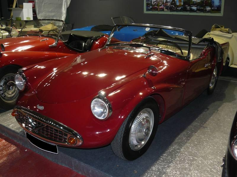 Retromobile 2012